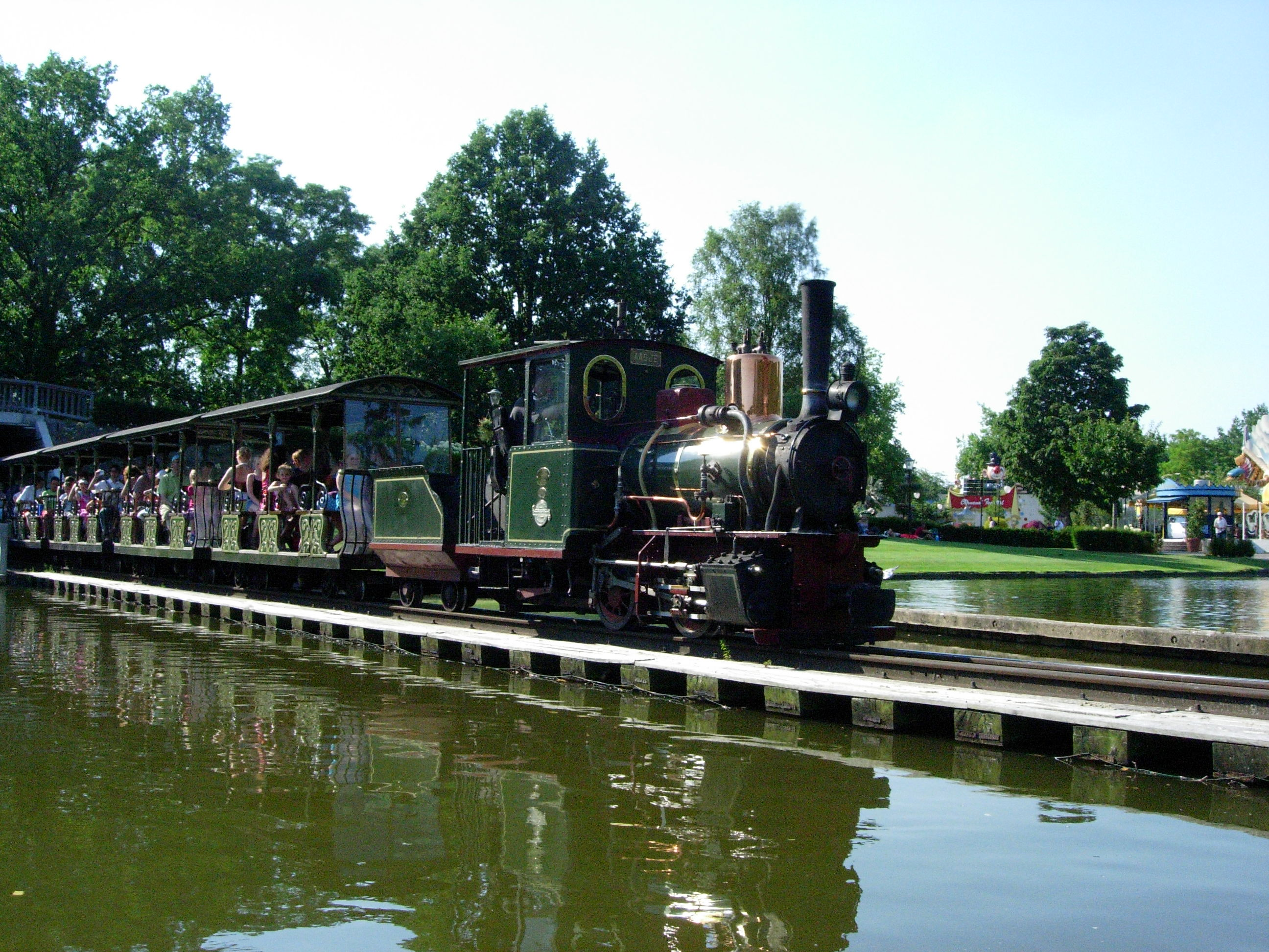 Le Train à vapeur Aagje depuis une gondoletta